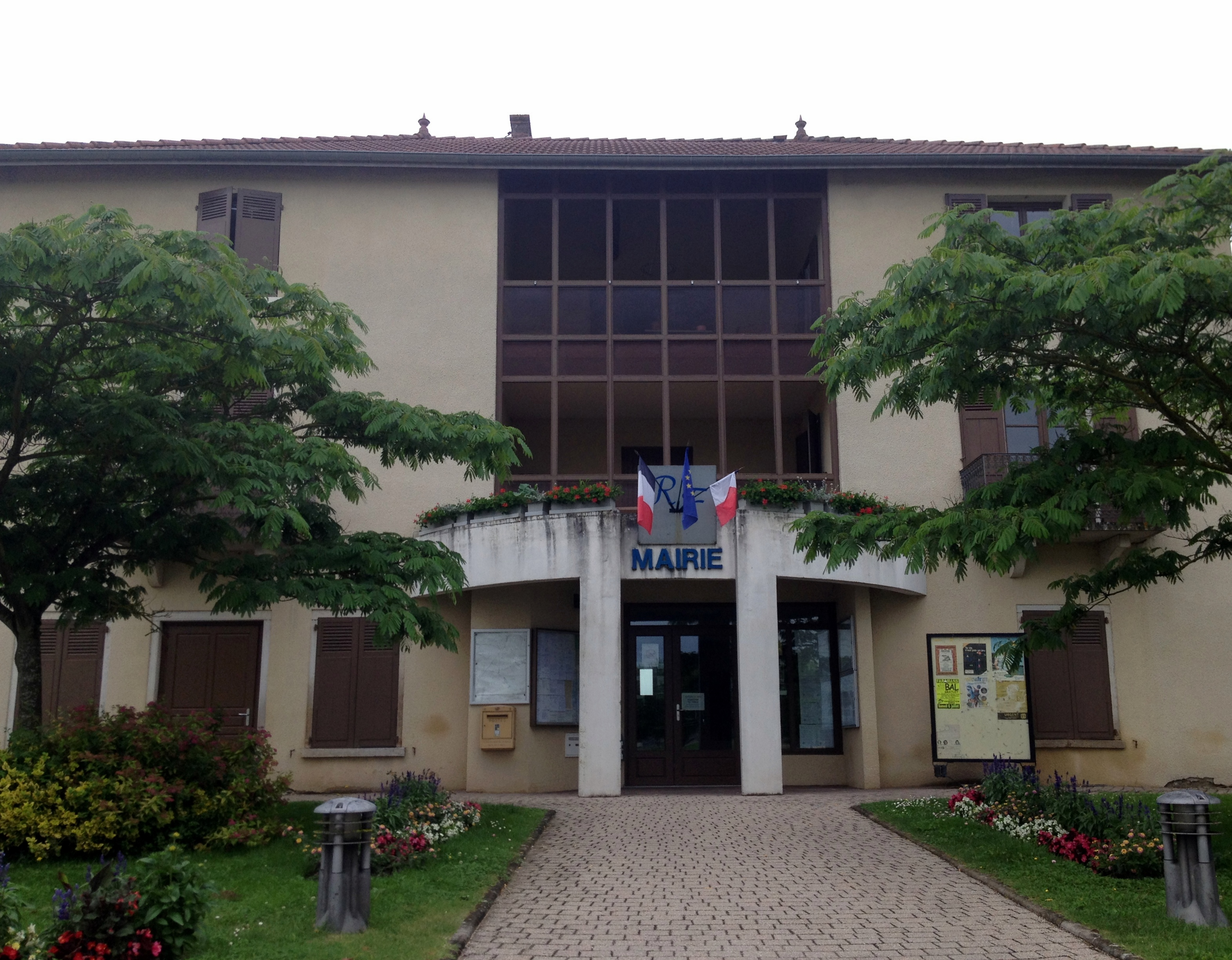 Mairie de Faramans (Ain)